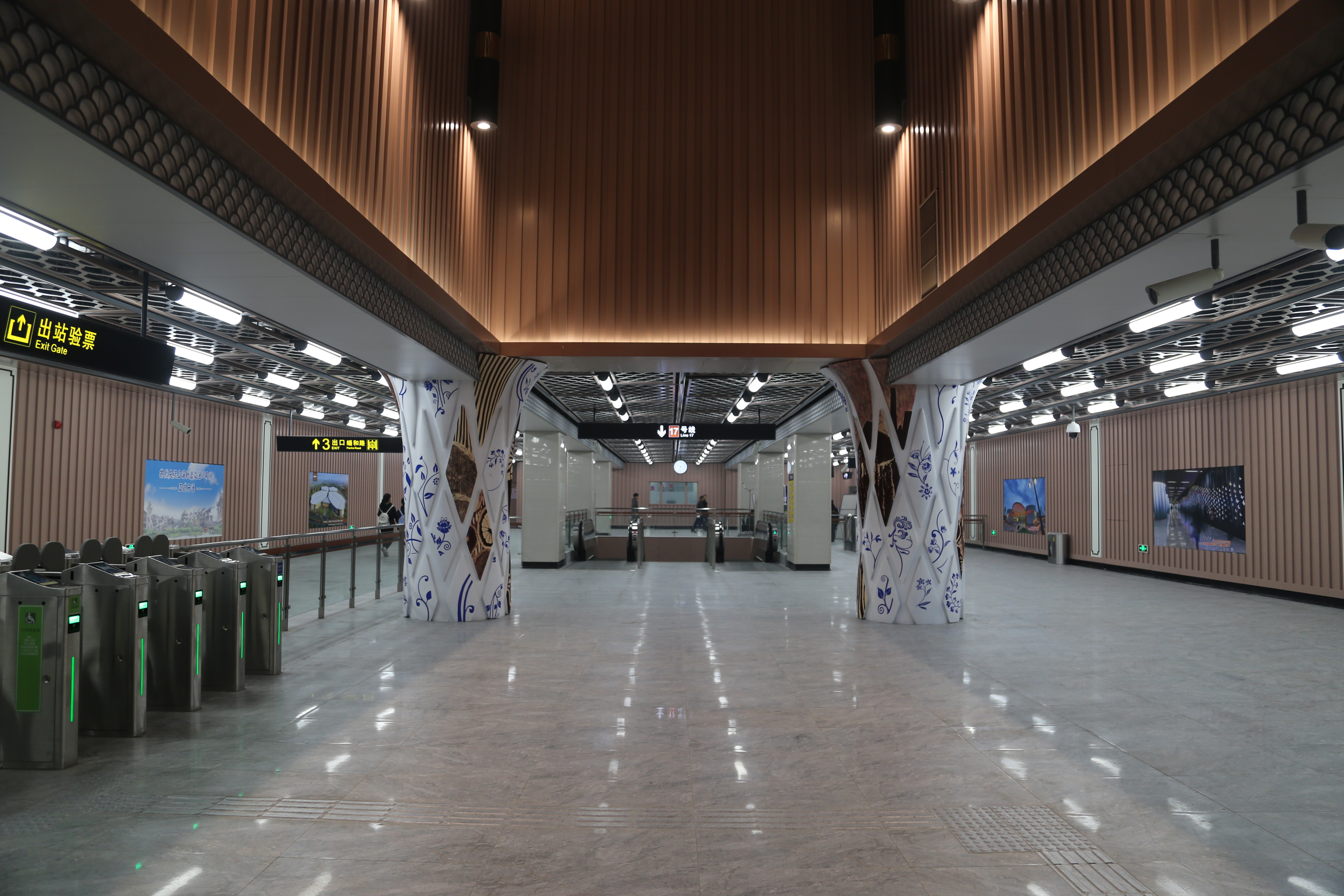 蟠龙路站站厅